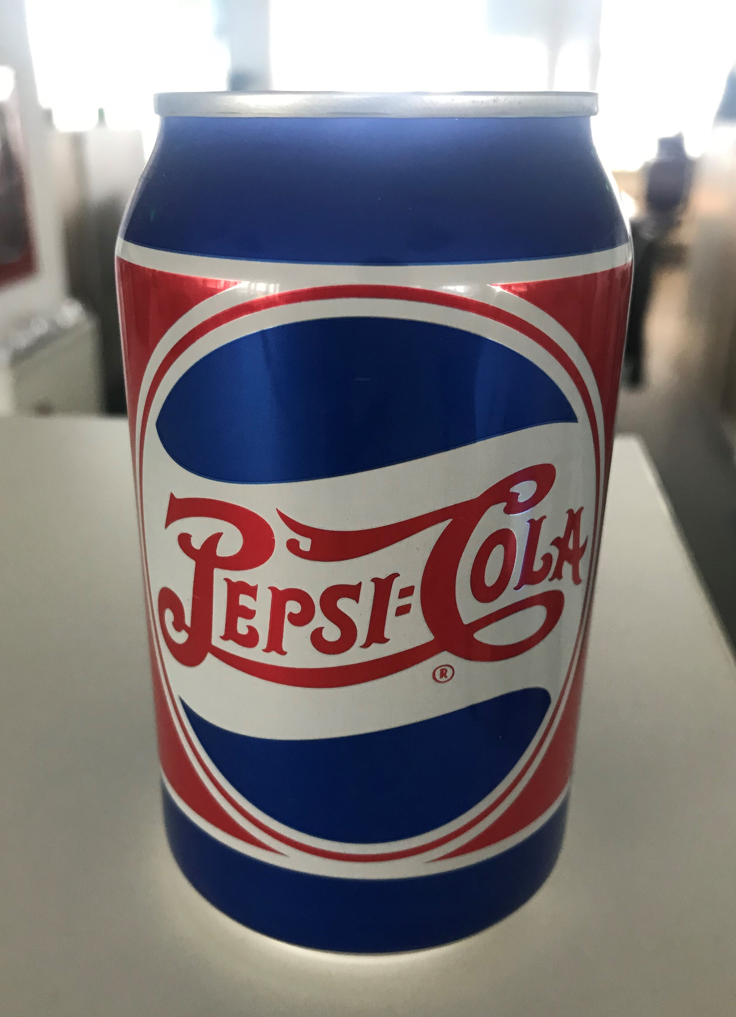 adevăratul gust de cola!